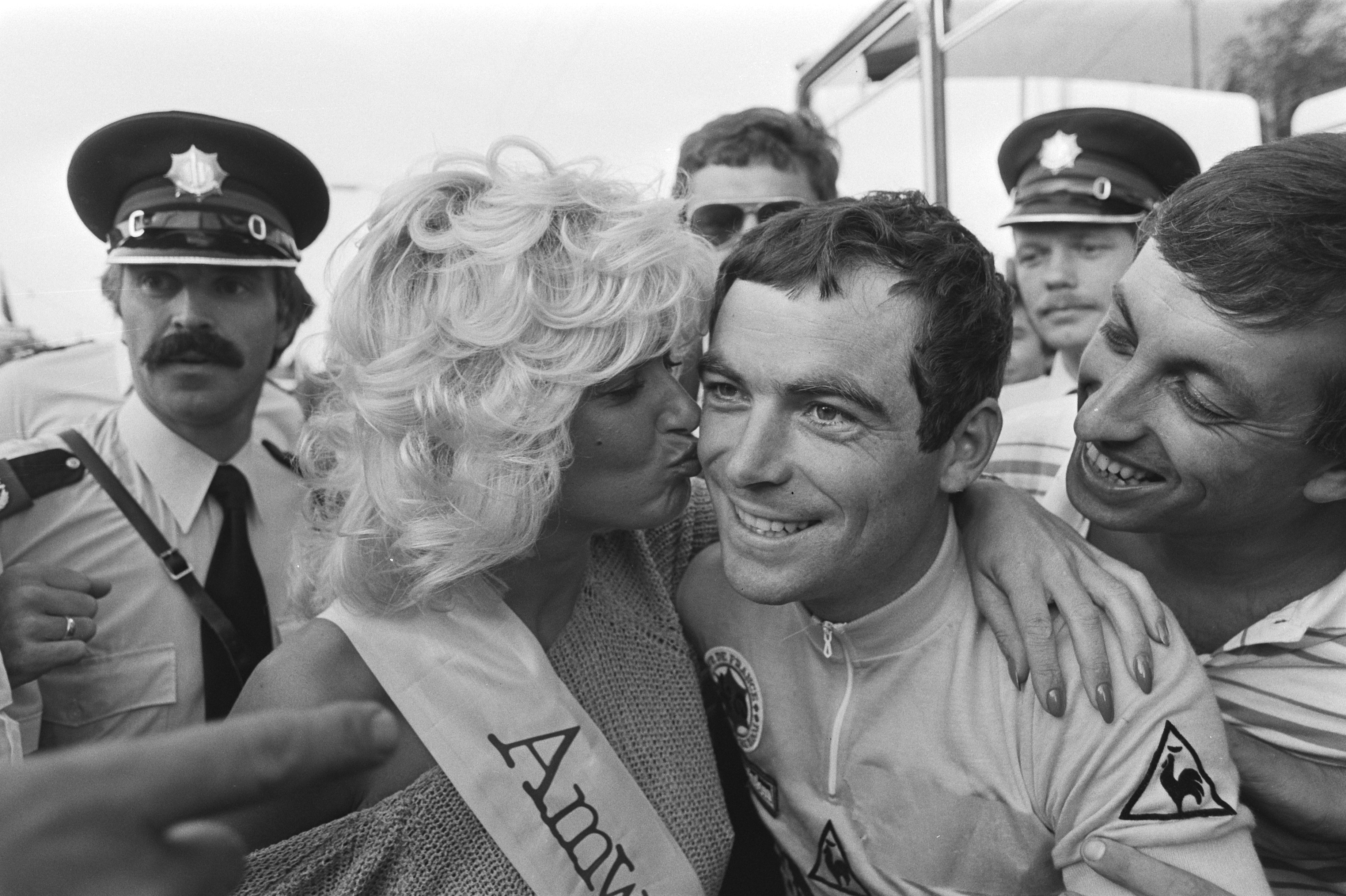 Collectie / Archief : Fotocollectie Anefo Reportage / Serie : [ onbekend ] Beschrijving : Profronde van Tiel; Bernard Hinault wordt begroet door rondemiss Vanessa Datum : 17 augustus 1982 Trefwoorden : wielrennen Persoonsnaam : Vanessa Fotograaf : Antonisse, Marcel / Anefo Auteursrechthebbende : Nationaal Archief Materiaalsoort : Negatief (zwart/wit) Nummer archiefinventaris : bekijk toegang 2.24.01.05 Bestanddeelnummer : 932-2817